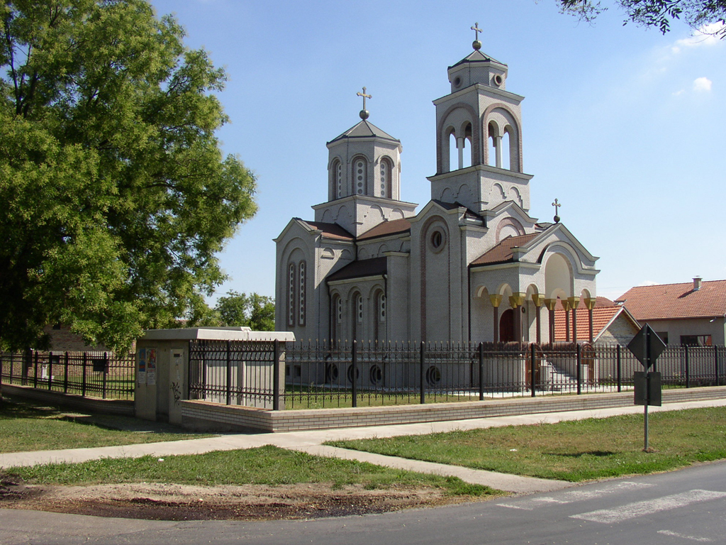 Autor Laslo Varga